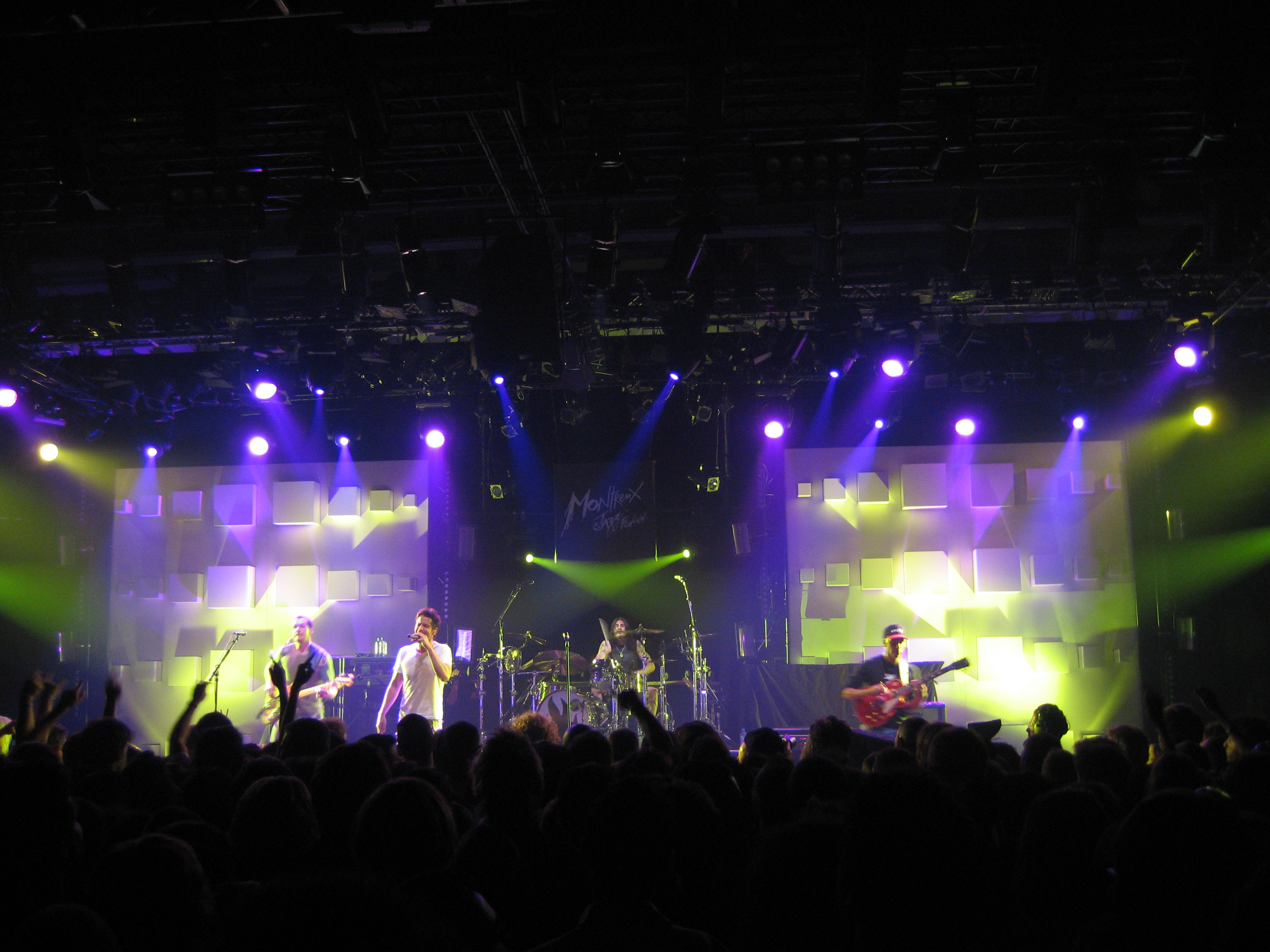 Audioslave live al Montreux Jazz Festival nel 2005. Fonte: Autore: da Vernayaz in svizzera